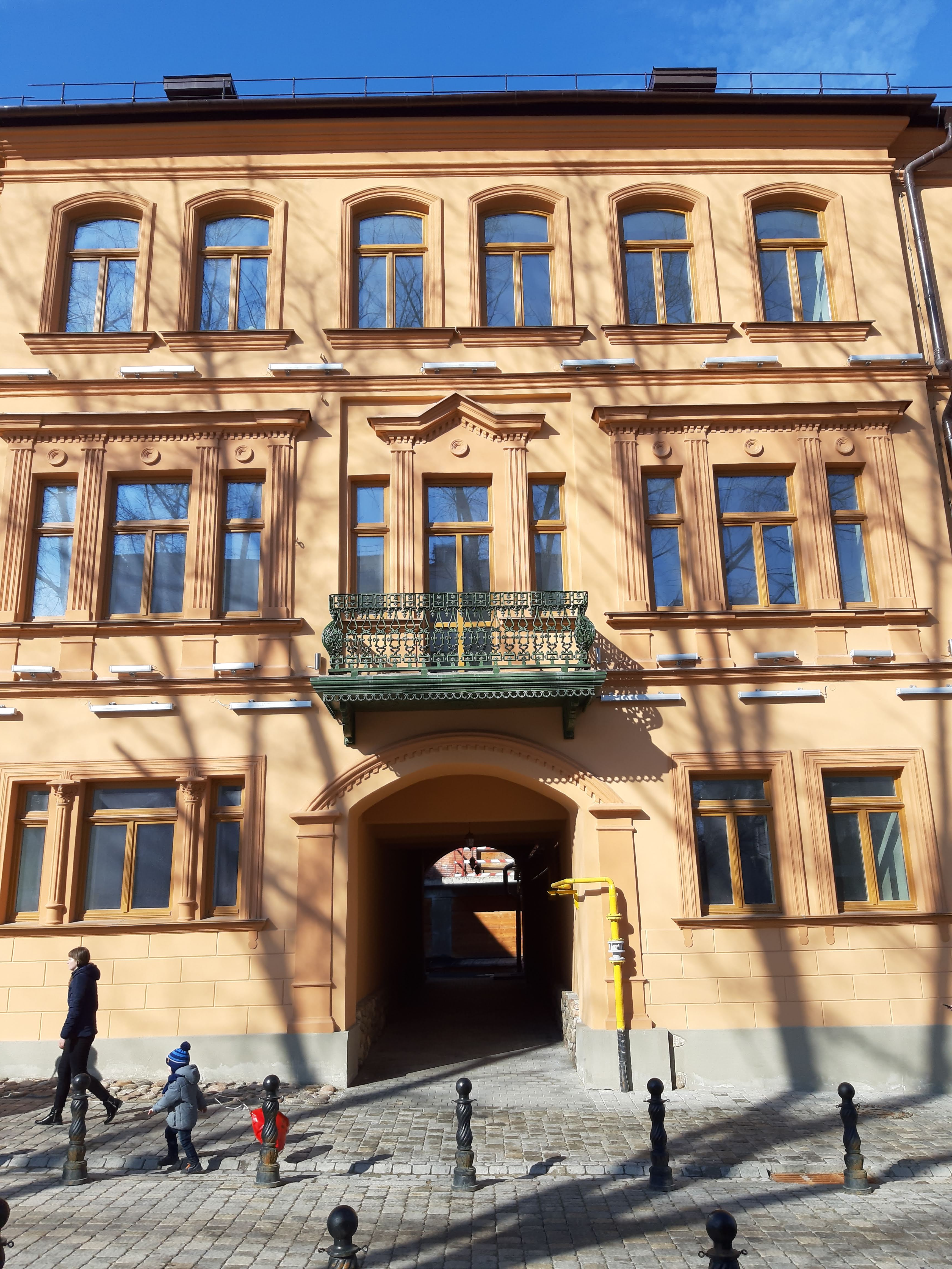 Мінск. Рэвалюцыйная вуліца ў сакавіку 2019